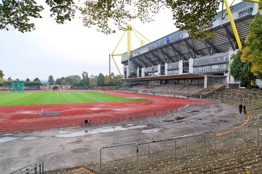 Signal Iduna Park 2013